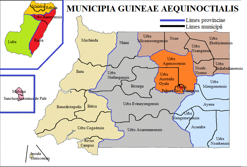 Municipia Guineae Aequinoctialis.